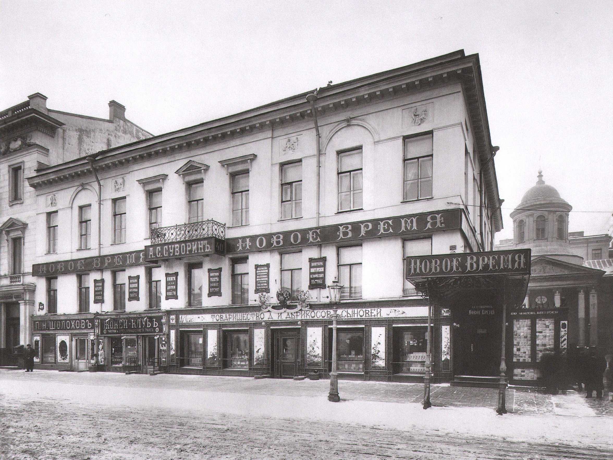 Санкт-Петербург. Невский проспект. Вид на издательство А.Суворина и магазин "Тов-ва А.И.Абрикосова сыновей". 1901г.